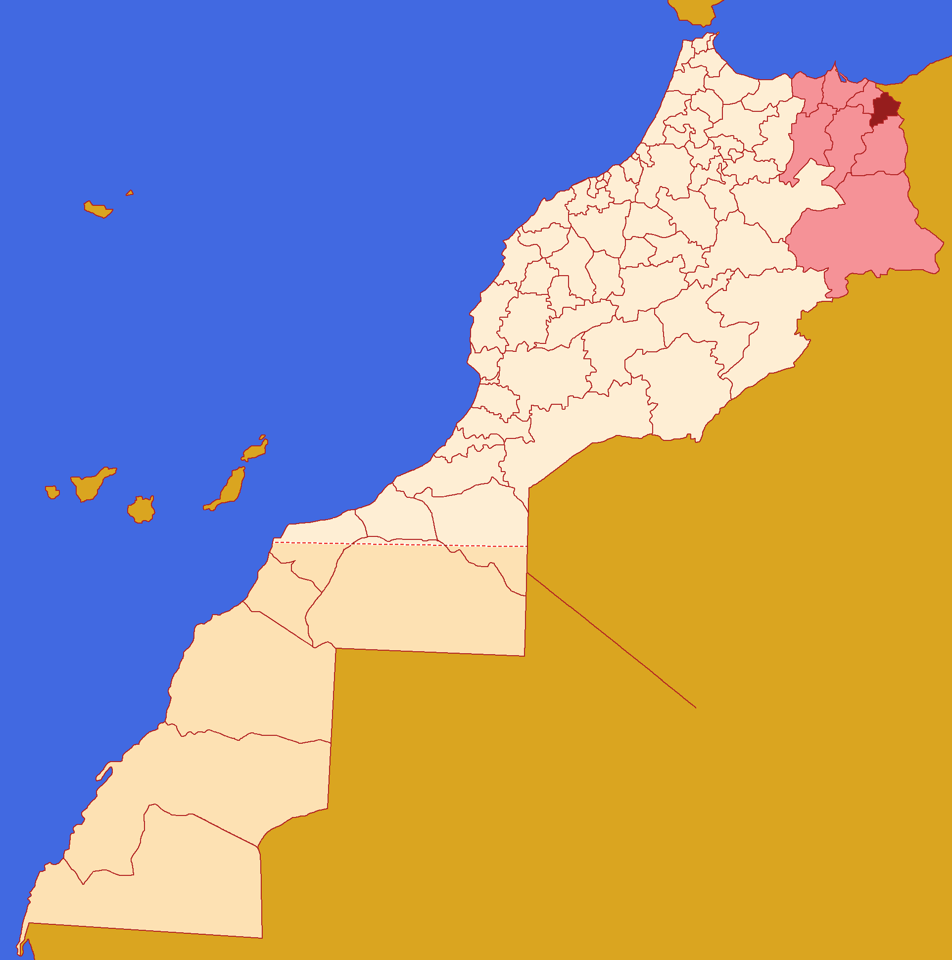 Localização da prefeitura de Oujda-Angad dentro da região de A Oriental e dentro de Marrocos